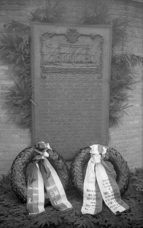 Kranzniederlegung am Marineehrenmal in Emden